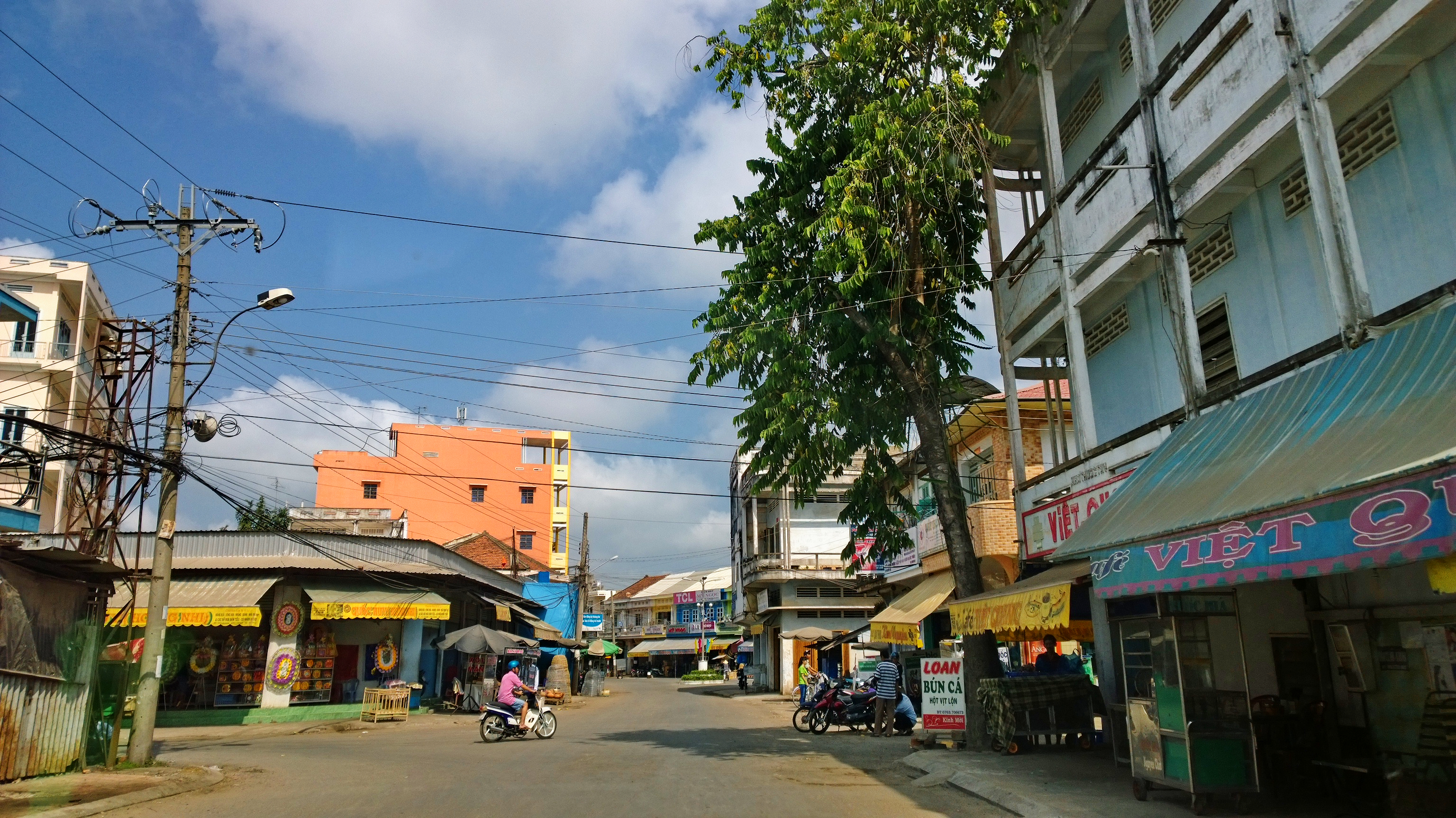 Duong Nguyen Hue,Tx tanchauLong Châu, Tân Châu, An Giang, Việt Nam